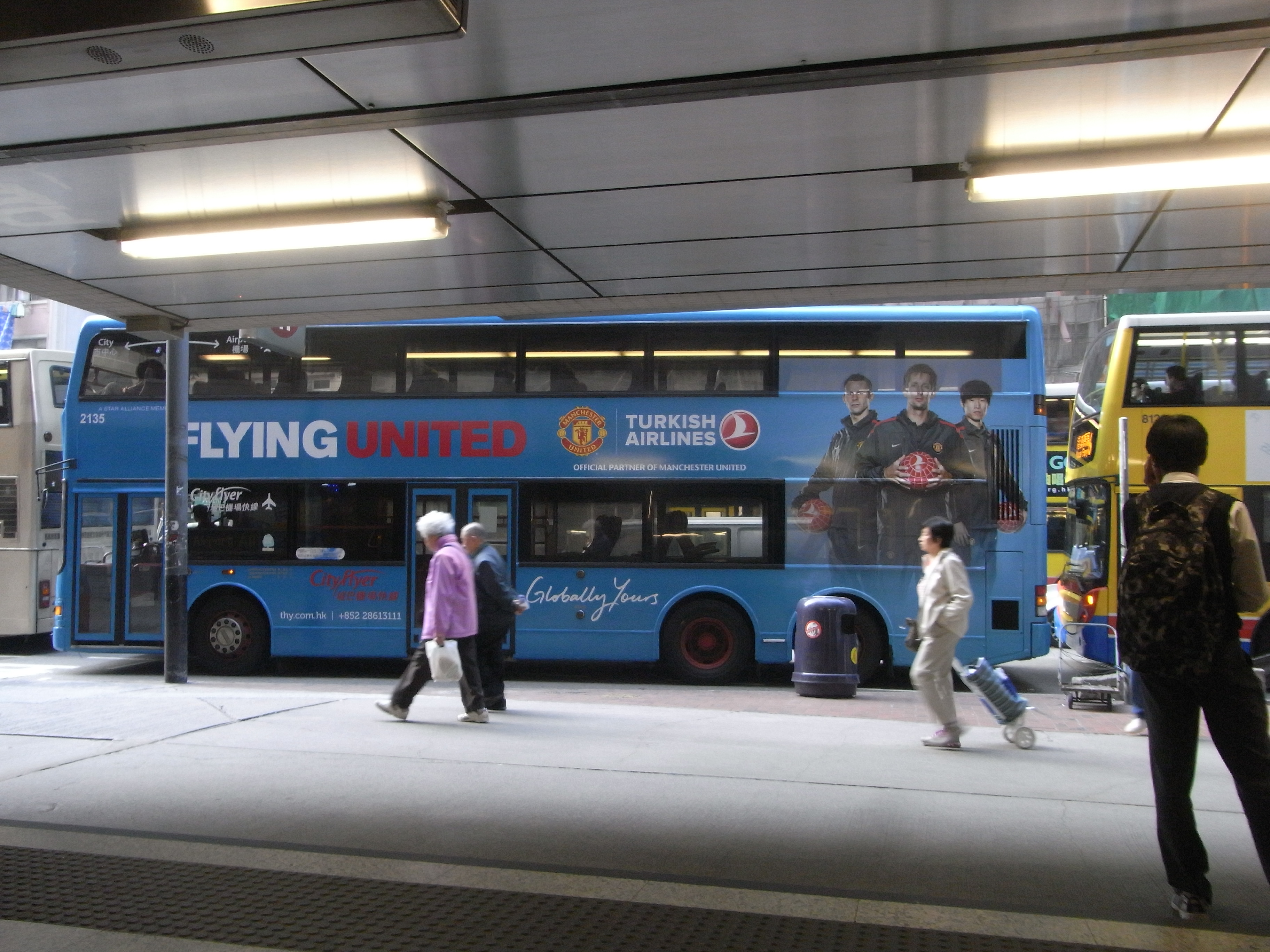 香港zh:炮台山zh:英皇道，巴士車身廣告